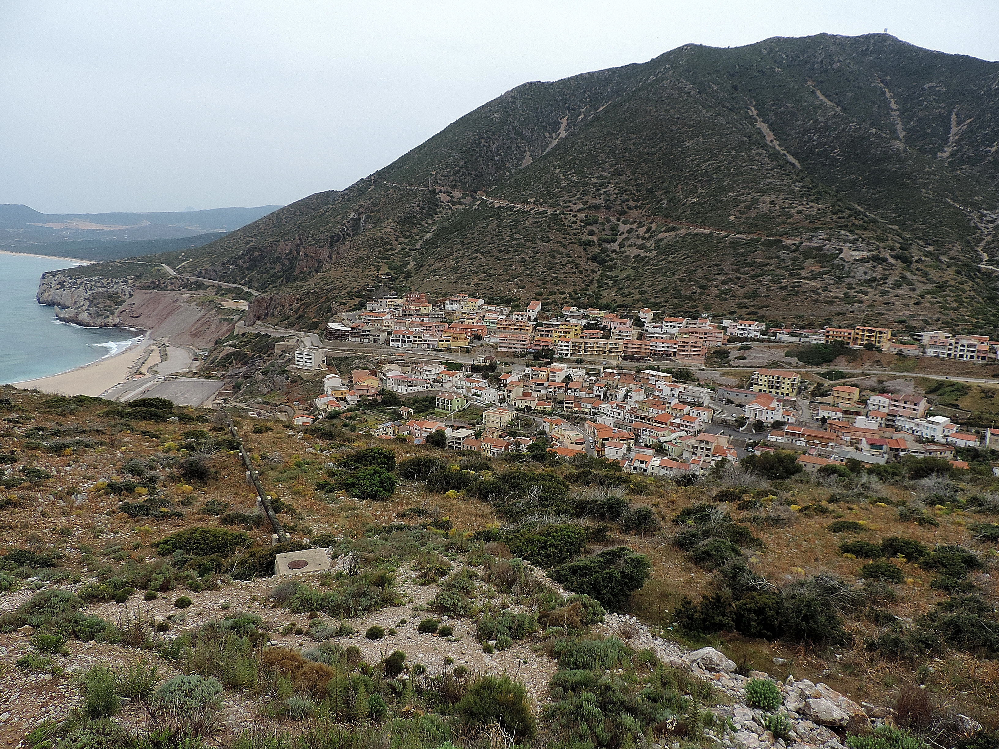 Veduta di Buggerru, Sud Sardegna